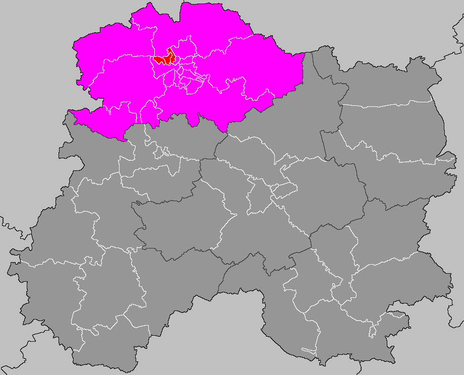 Localisation du canton de Reims-8